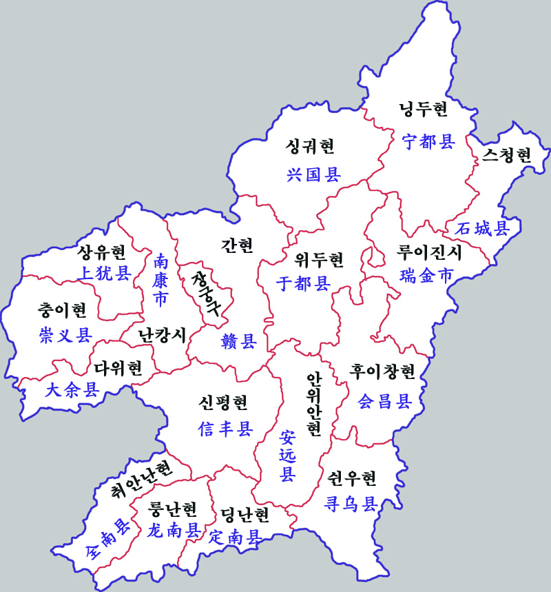 간저우시 현급구역도